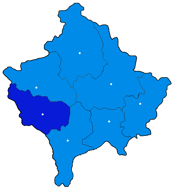 Map of Đakovica